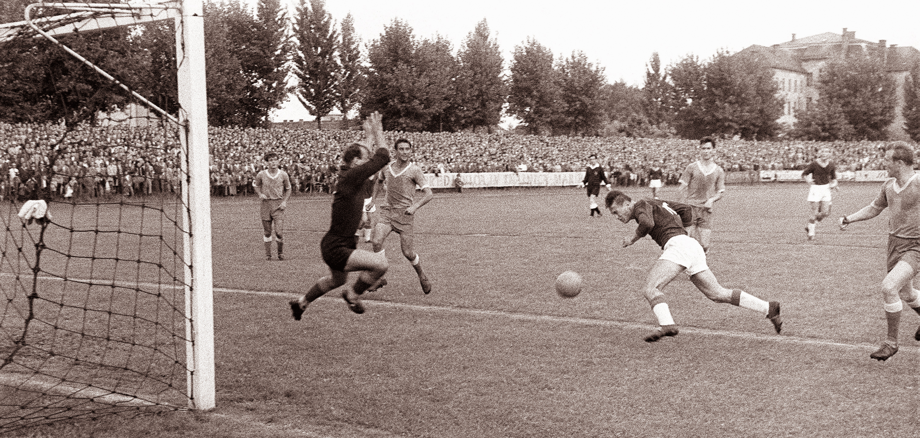 Nogometna tekma Maribor - Uljanik